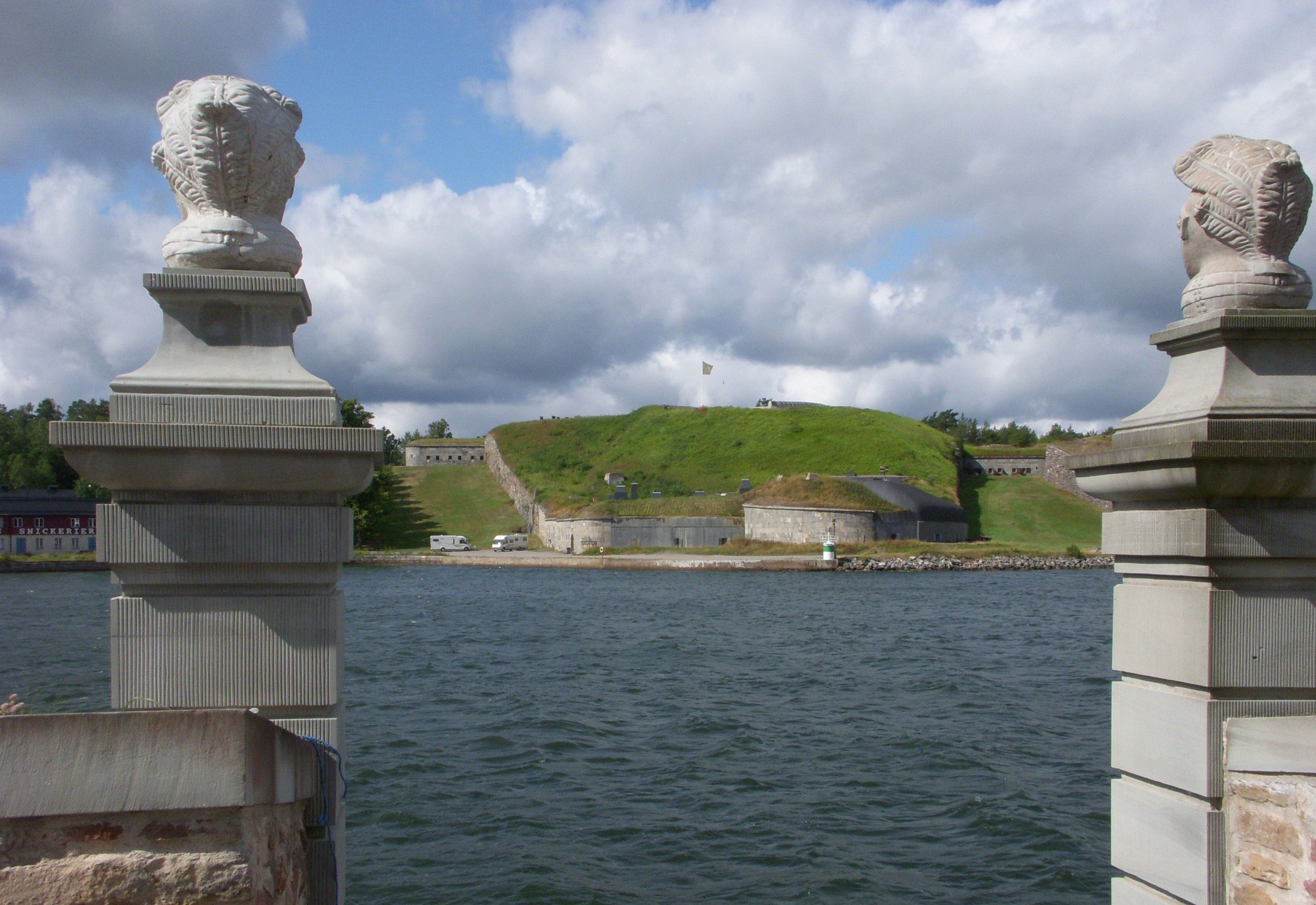 Vy från Fredriksborgs fästning (strandverket) över Oxdjupet till Oskar Fredriksborgs befästning